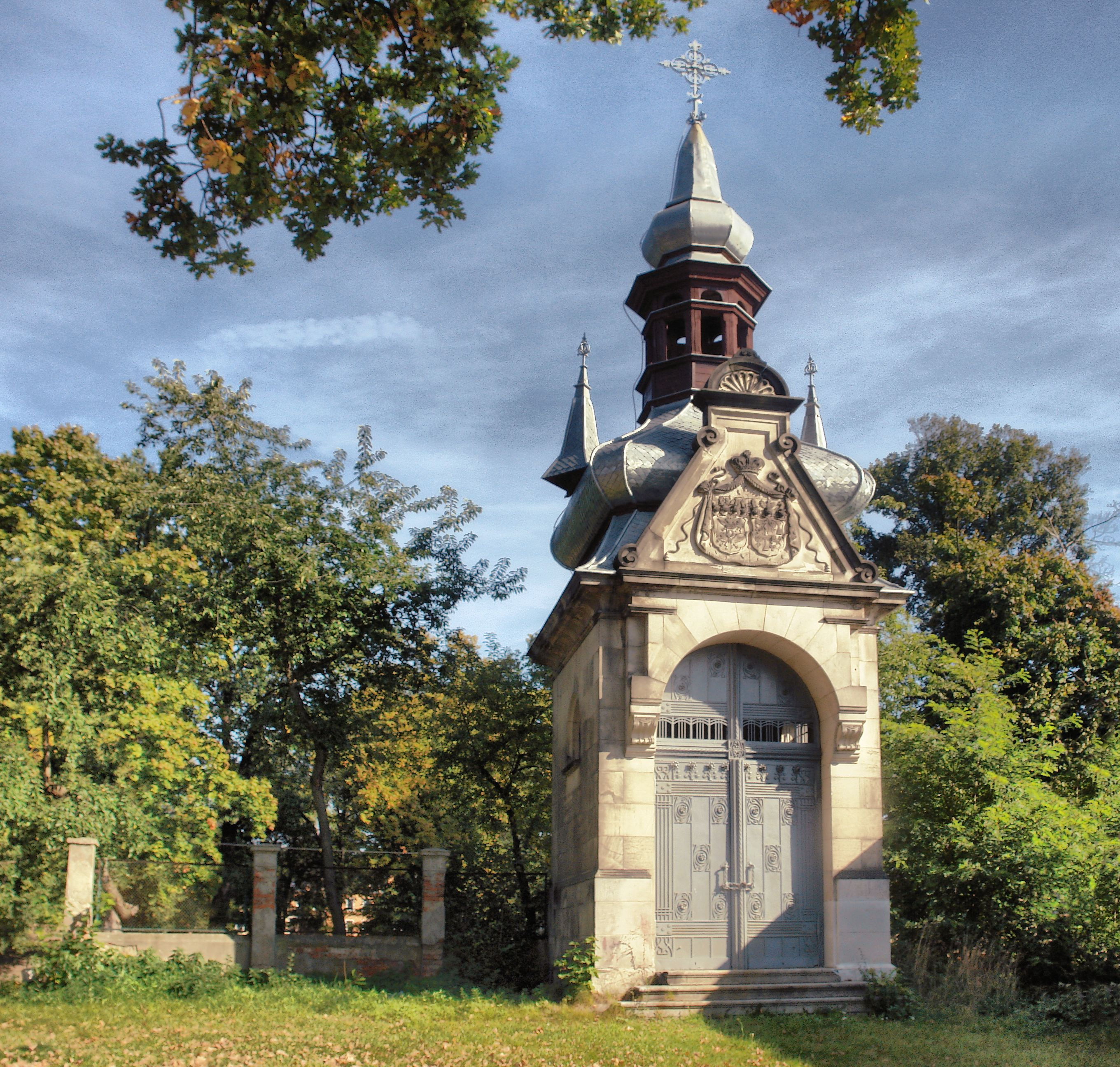 kaplica niedaleko zamku w Siedlisku (powiat nowosolski)